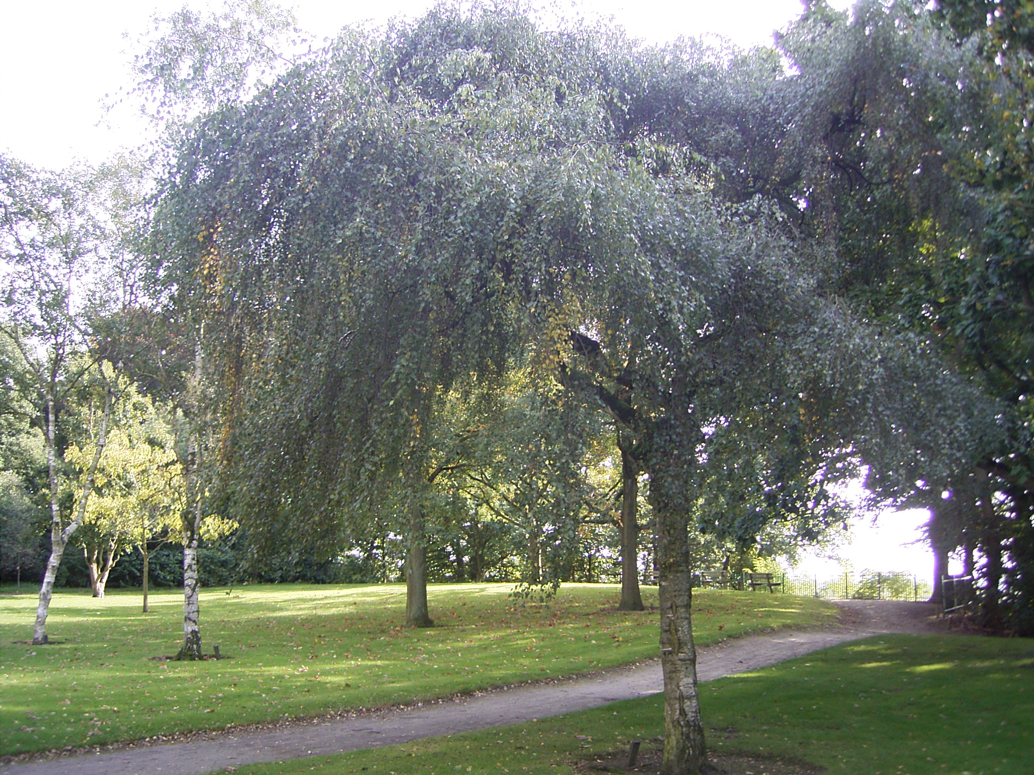 Deze foto toont de Ruwe berk, cv 'Youngii'. Ik nam de foto op zaterdag 1 oktober in het arboretum in Wageningen. This pic shows Betula pendula cv 'Youngii'. I took the photo in Wageningen, Netherlands.